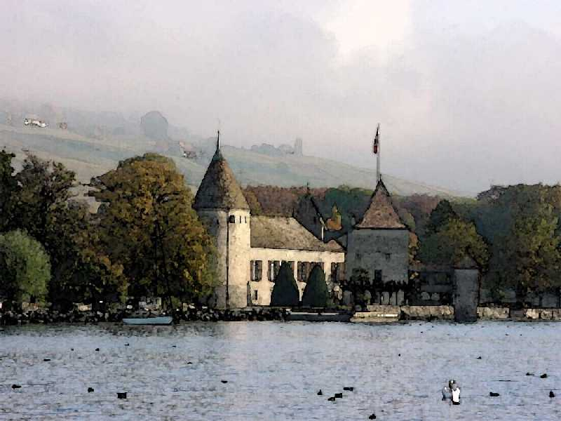 Aquarelle du château de Rolle